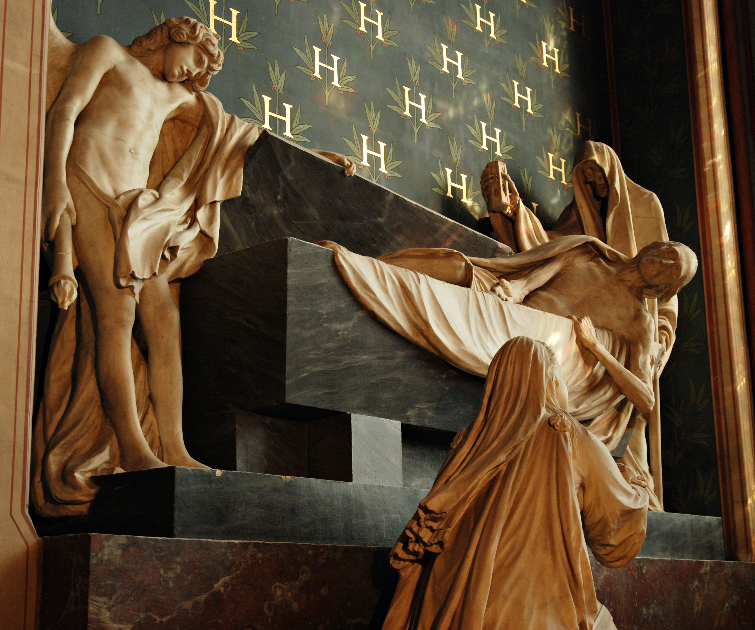 Mausolée du comte Claude-Henry d’Harcourt (mort en 1769), réalisée en 1776 par Jean-Baptiste Pigalle. Notre-Dame de Paris, chapelle Saint-Guillaume.